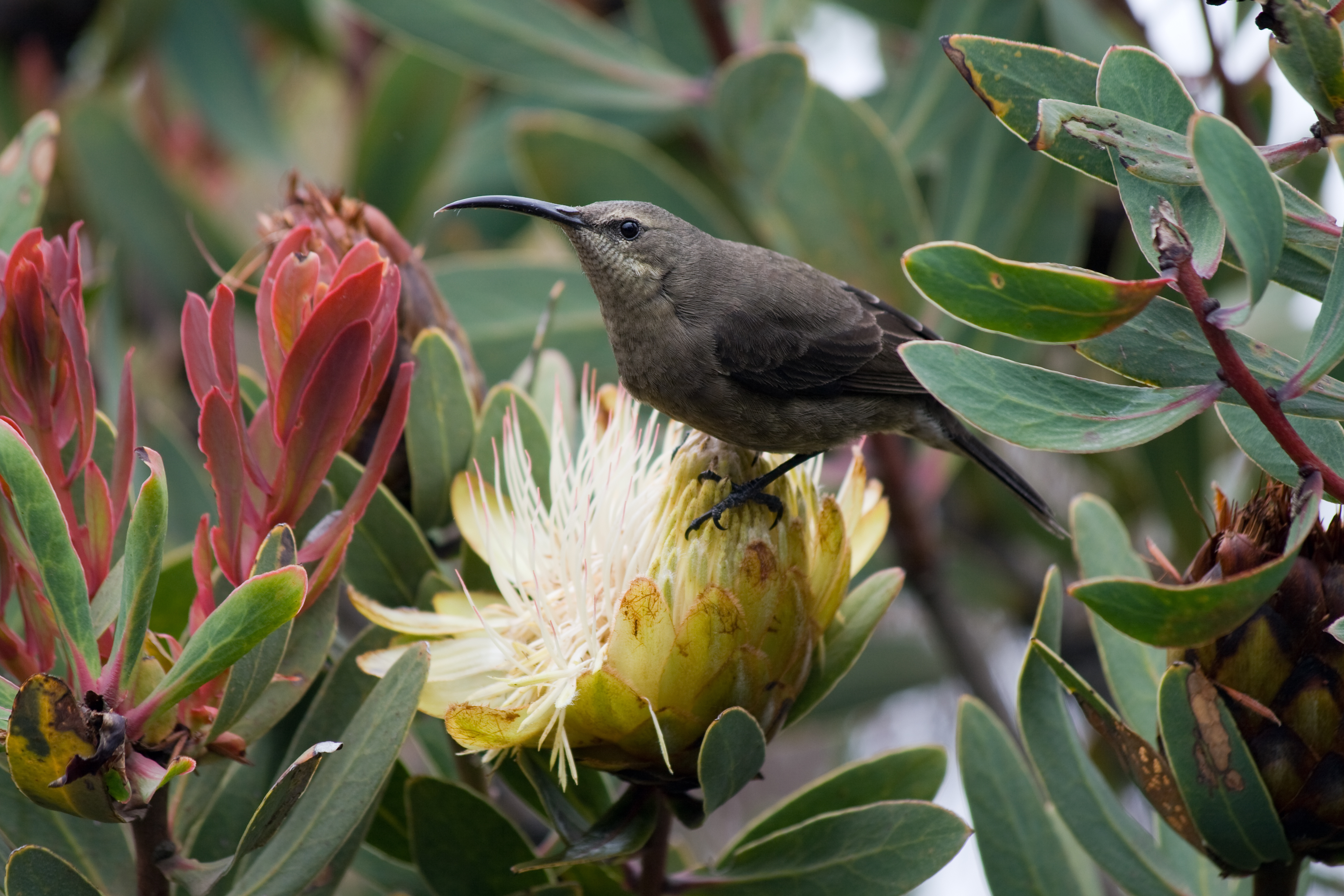 Female malachite sunbird. Nectarinia famosa